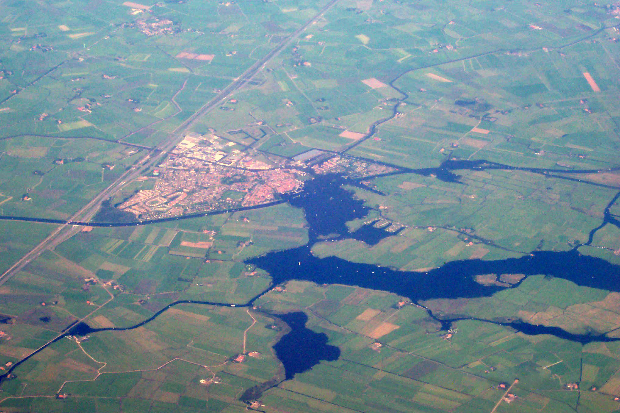 Categorie:Luchtfoto :nl:Categorie:Luchtfoto |Grouw (Original text: Luchfoto van Grouw)